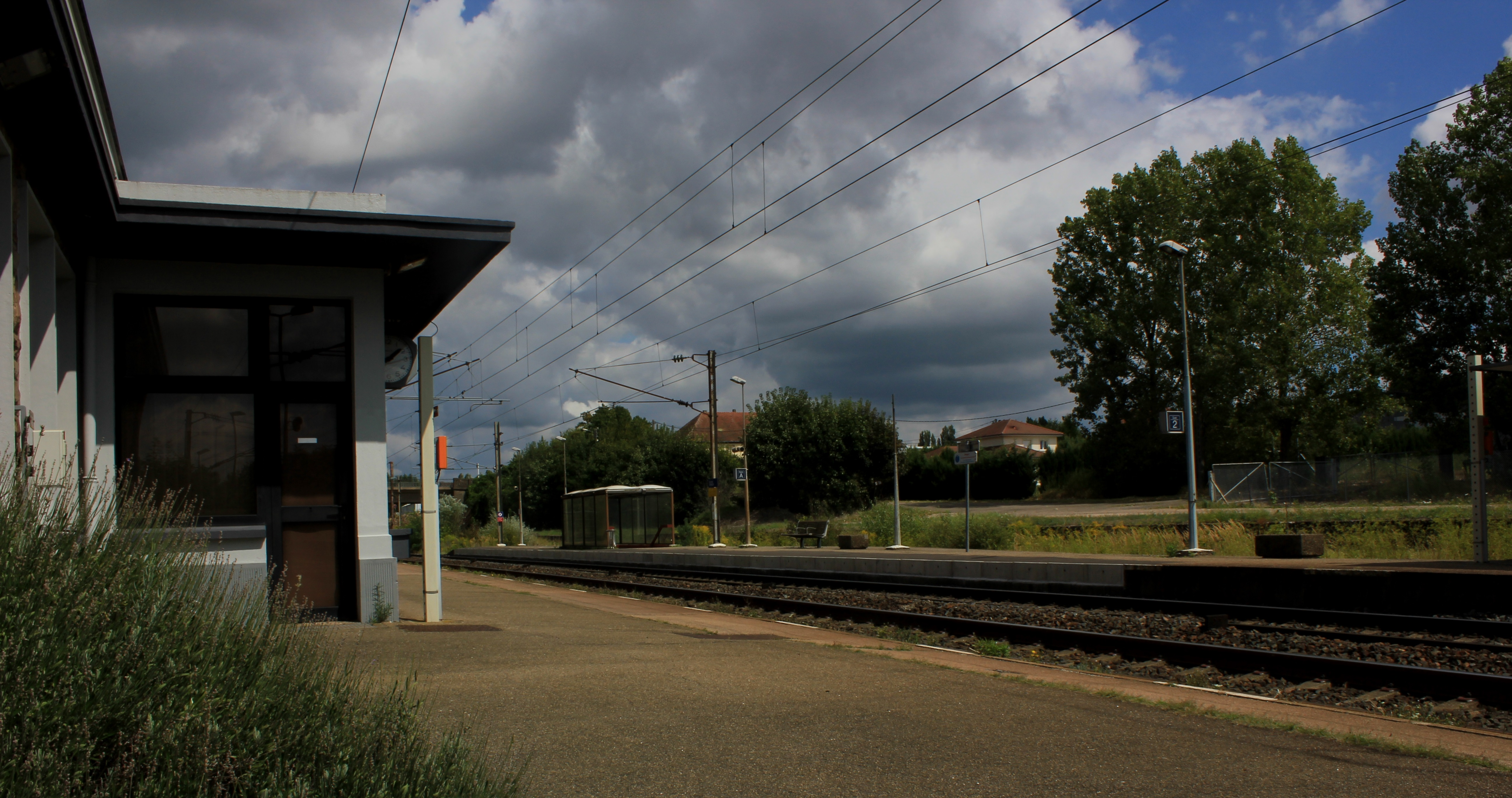 Aperçu des quais